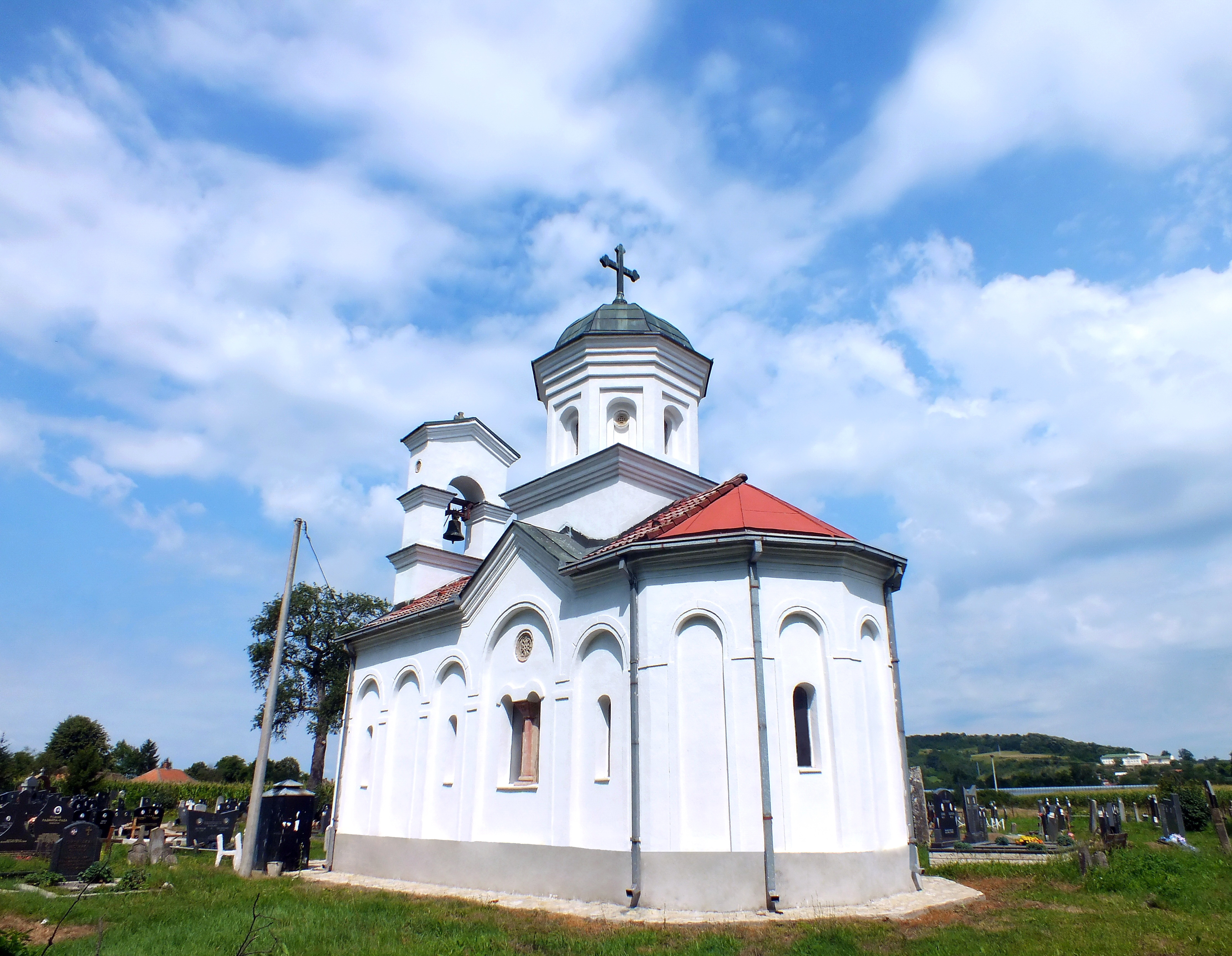 Српска православна црква Свети Ђорђе у Дивцима код Ваљева,Србија.. Црква Светог Ђорђа на гробљу у Дивцима,Ваљево,Србија...